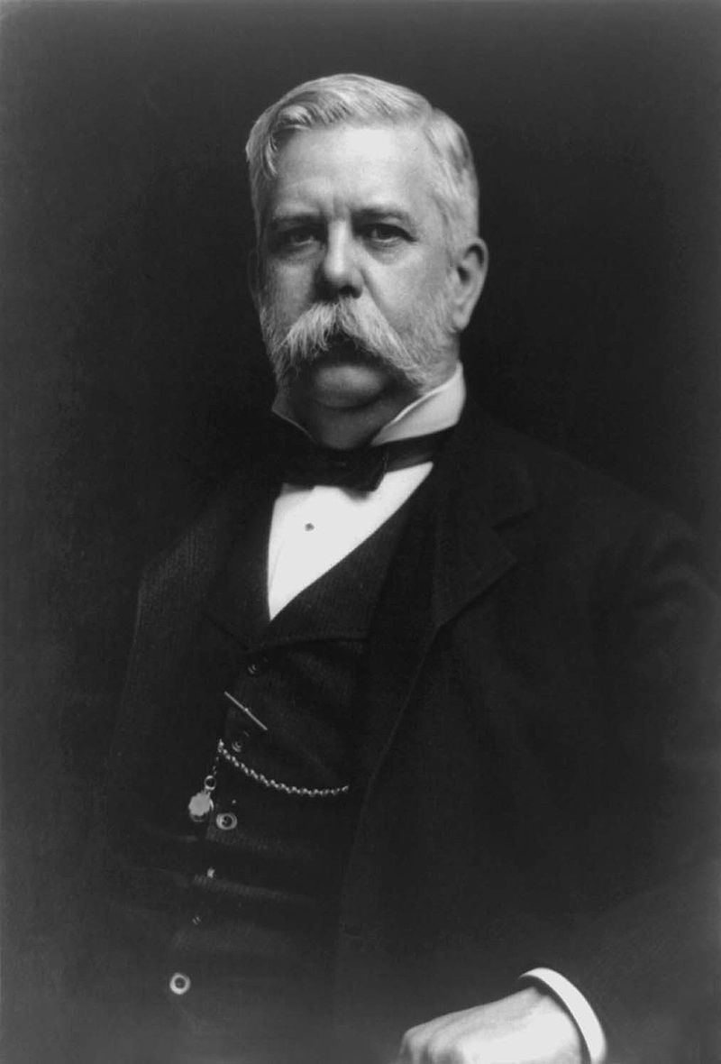 O empresario e enxeñeiro estadounidense George Westinghouse introduciu en 1886 unha rede de distribución de potencia rival baseada na corrente alterna (AC).